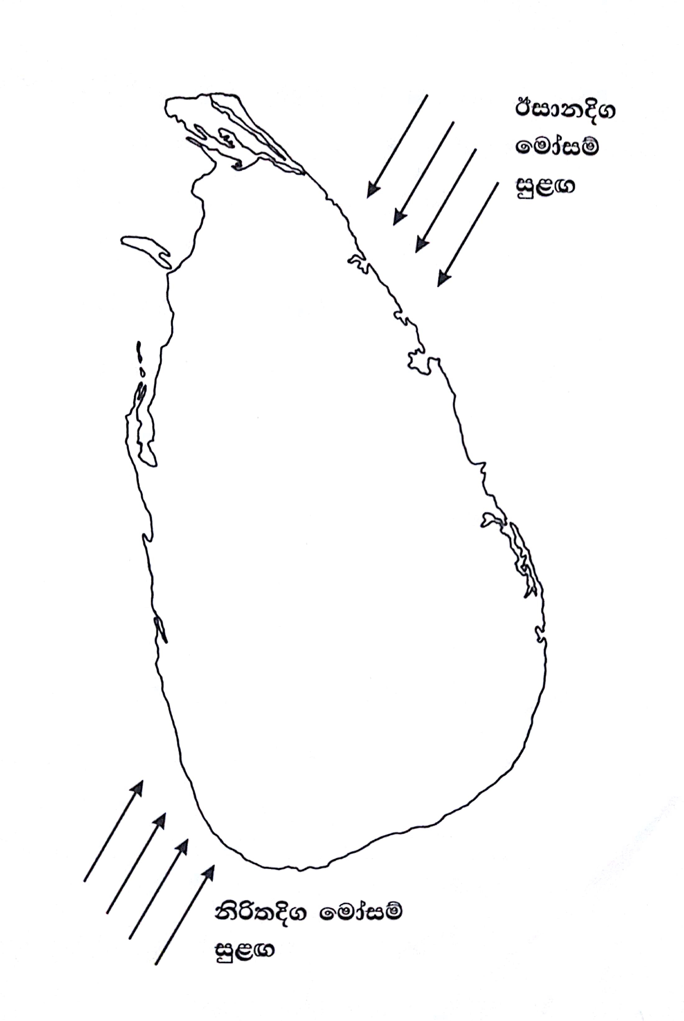 සිංහල: ඊසාන දිග මෝසම් හා නිරිත දිග මෝසම් සුළං